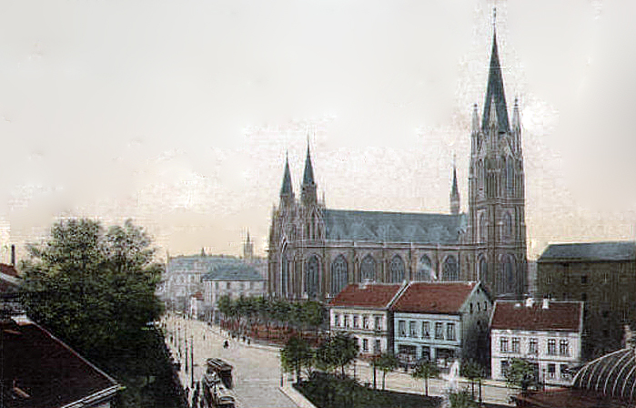 Gertrudiskirche am Viehofer Platz in Essen